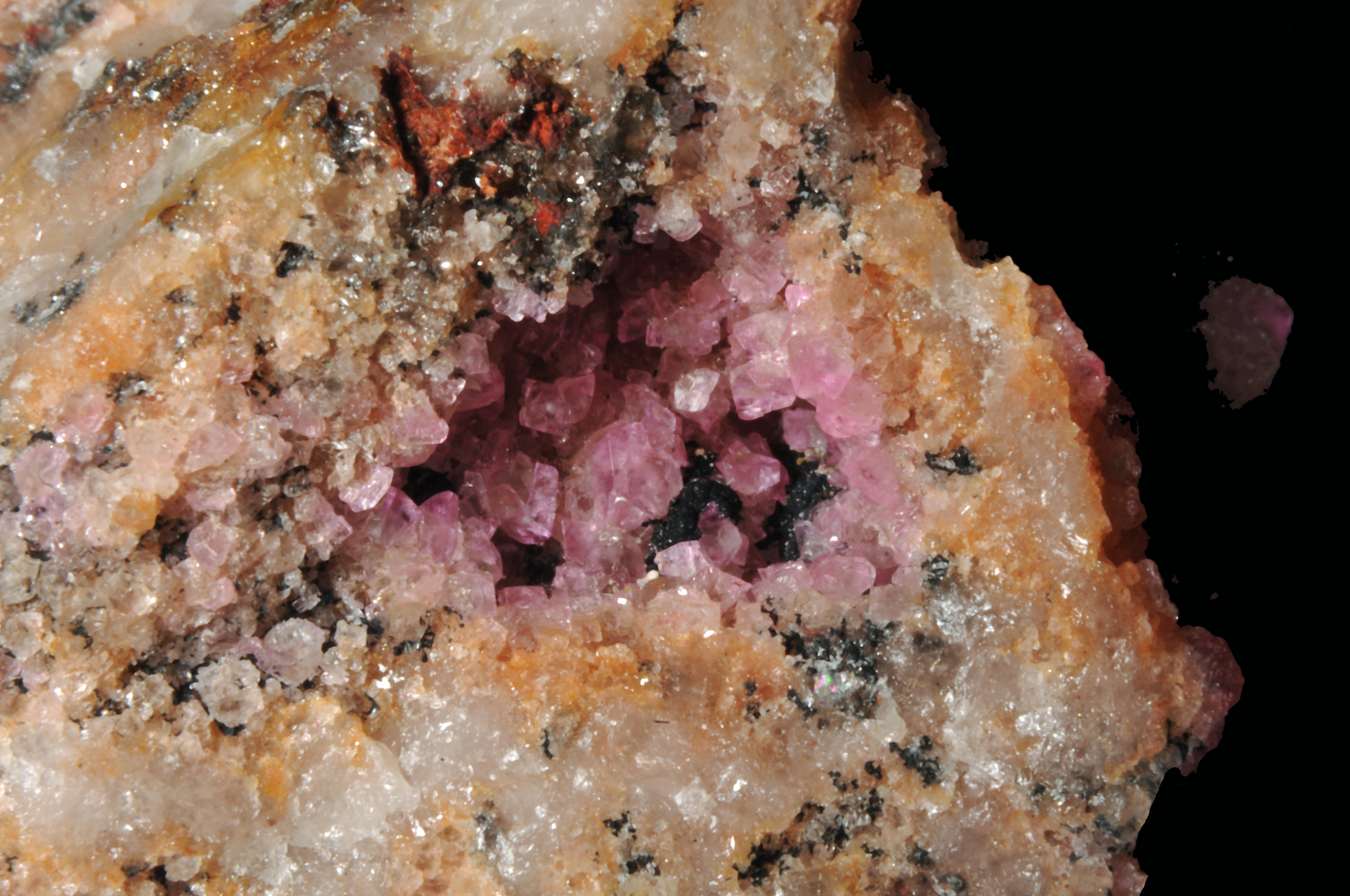 cristaux de manganocalcite, cristaux de manganite : Idikel Mn deposit, Azilal Province, Tadla-Azilal Region, Morocco |1= crystals of manganocalcite, crystals of manganite : Idikel Mn deposit, Azilal Province, Tadla-Azilal Region, Morocco